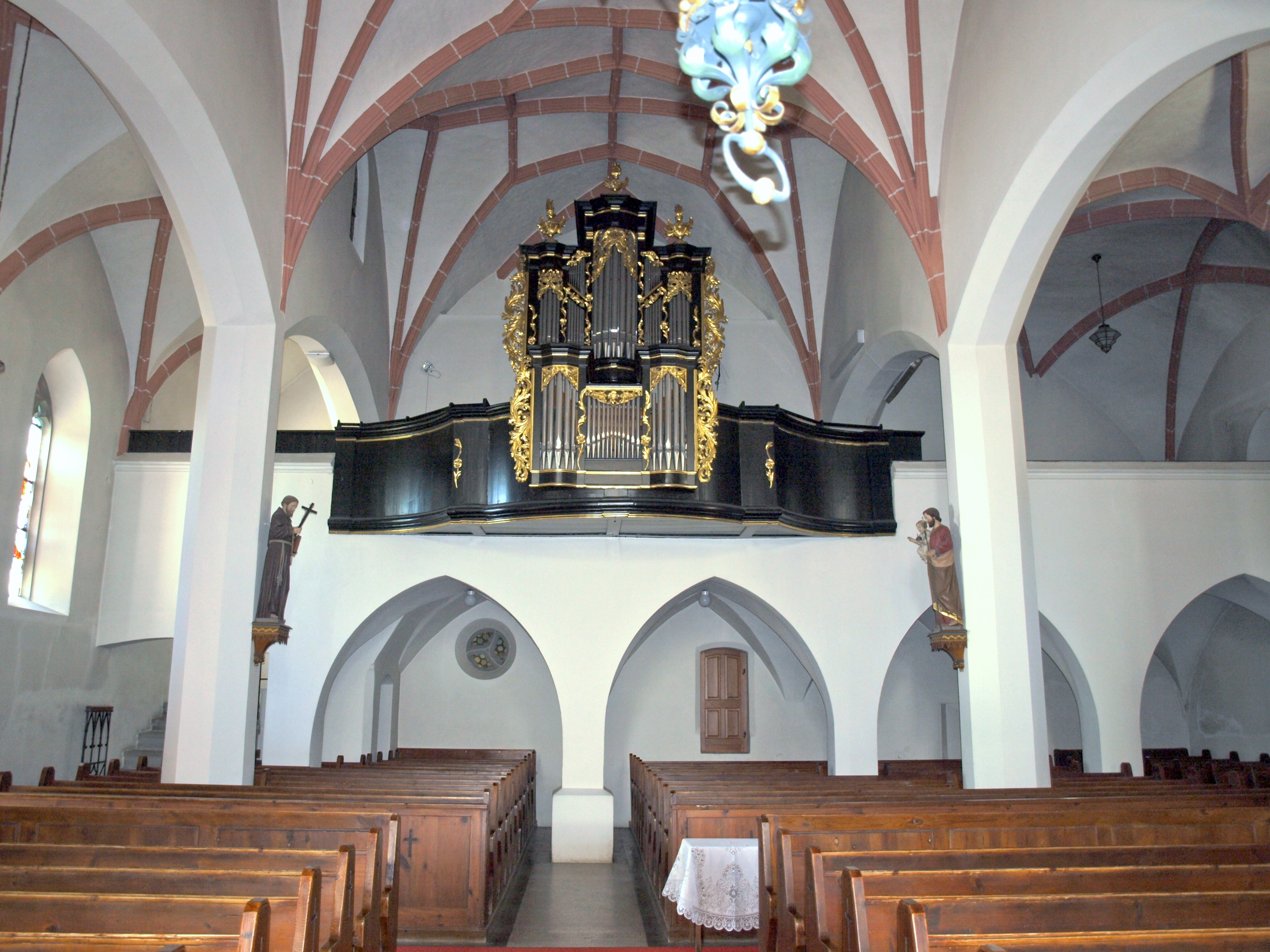 Kath. Pfarrkirche hl. Georg und Friedhof